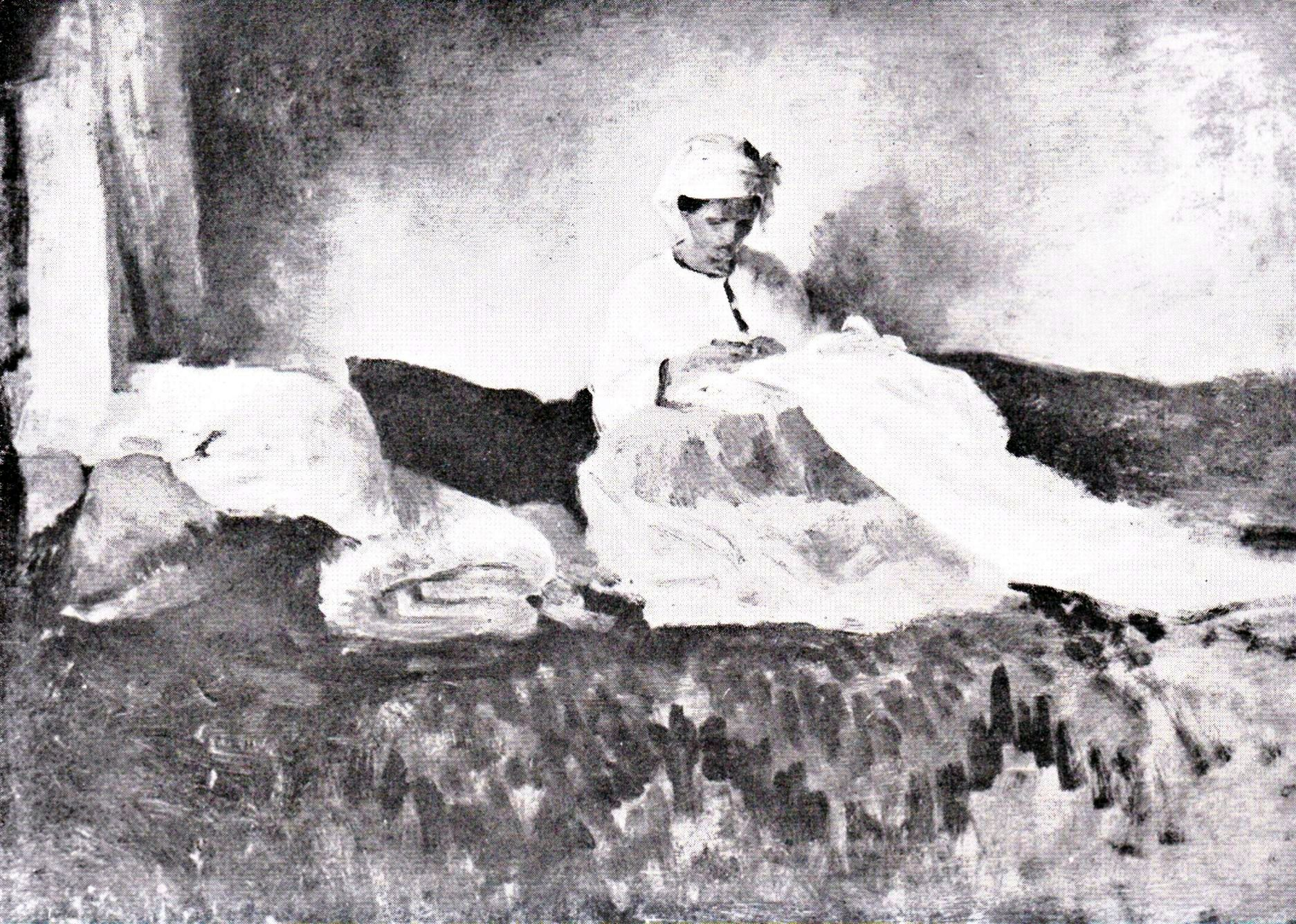 Maria Grigorescu (căsătorită Ghigorț) cosând